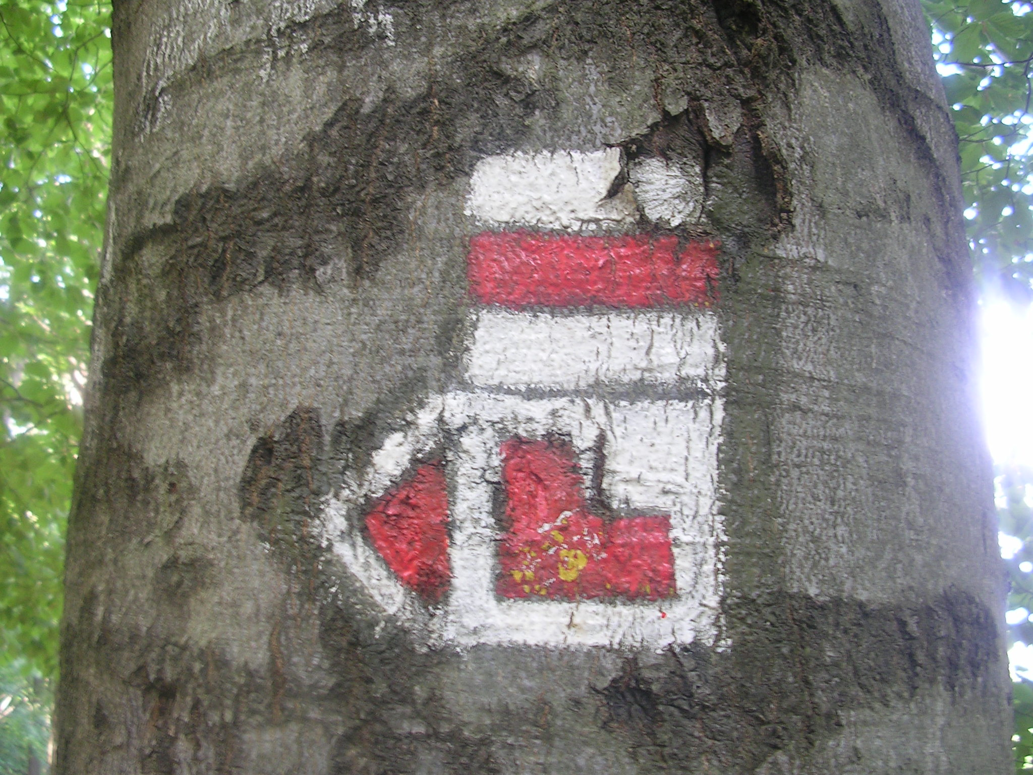 Turistická odbočka ke zřícenině Ralsko